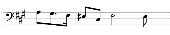 Zweites Thema der Tripelfuge fis-Moll aus dem 2. Teil des Wohltemperierten Klaviers von Johann Sebastian Bach (BWV 883)